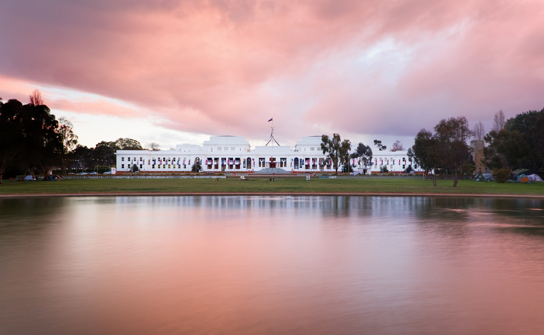 1.2 only